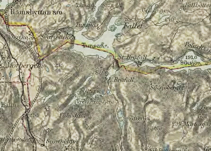 Stora och Lilla Bråfall på Generalstabskartan